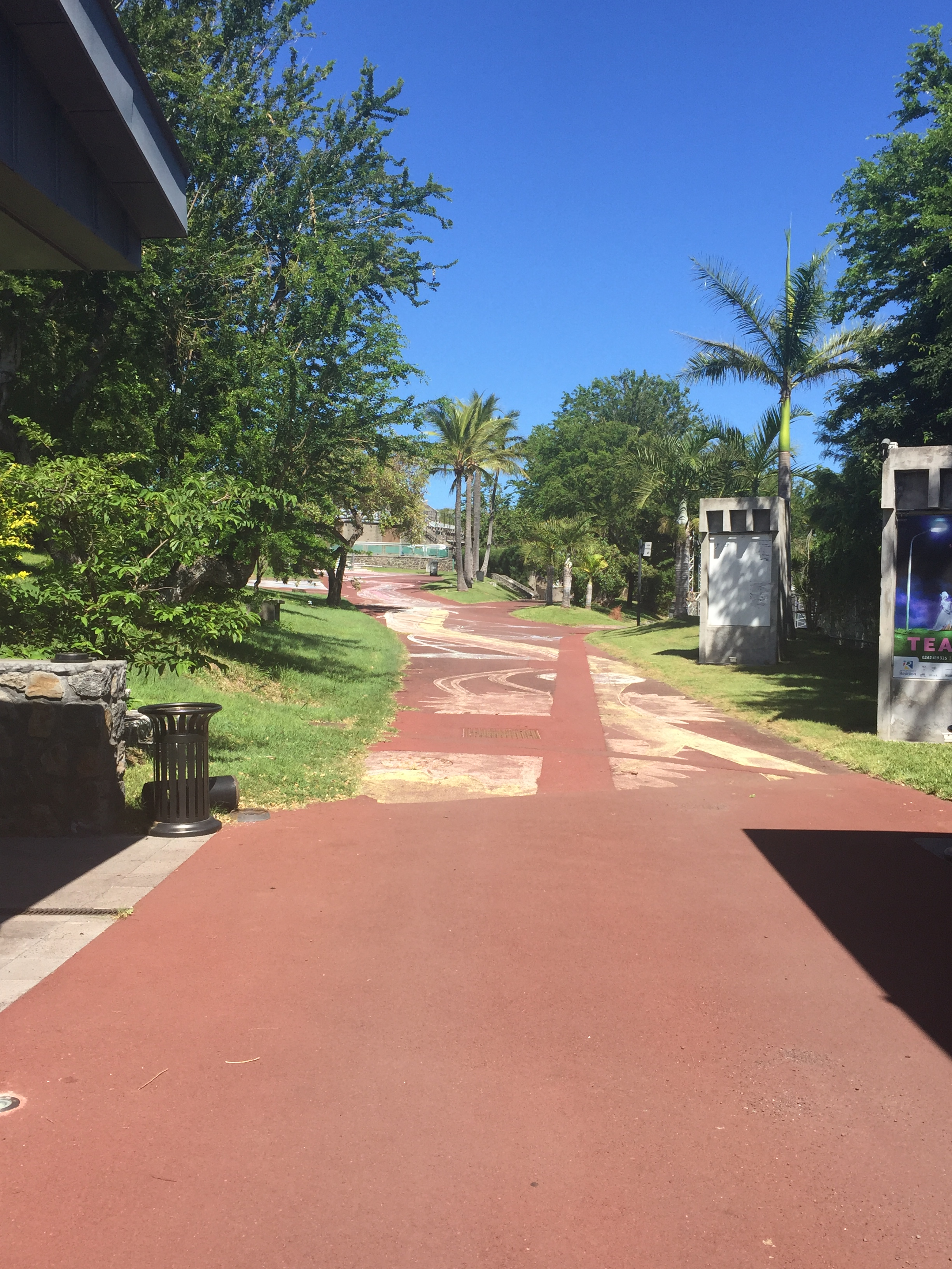 Entrée dans l'espace du théâtre, 11 Mars 2018